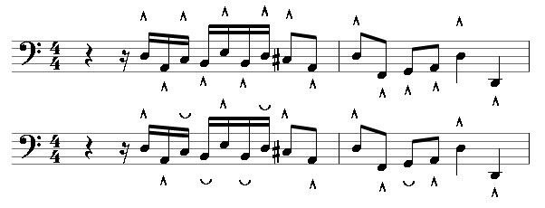 Spieltechnik Pedal (Orgel).